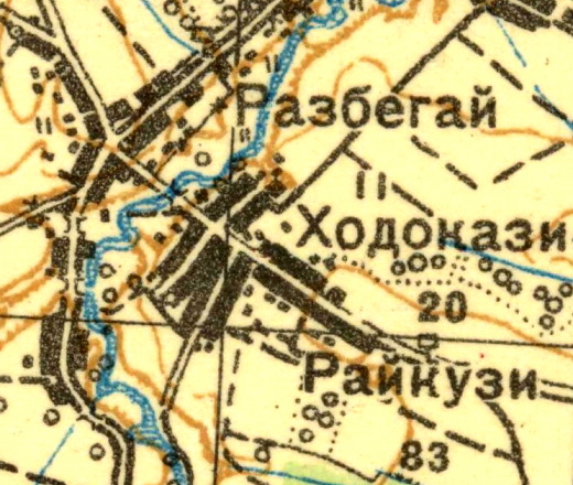 Топографическая карта Ленинградской области, квадрат О-35-12-Г (Ропша), деревни Разбегаево и Райкузи